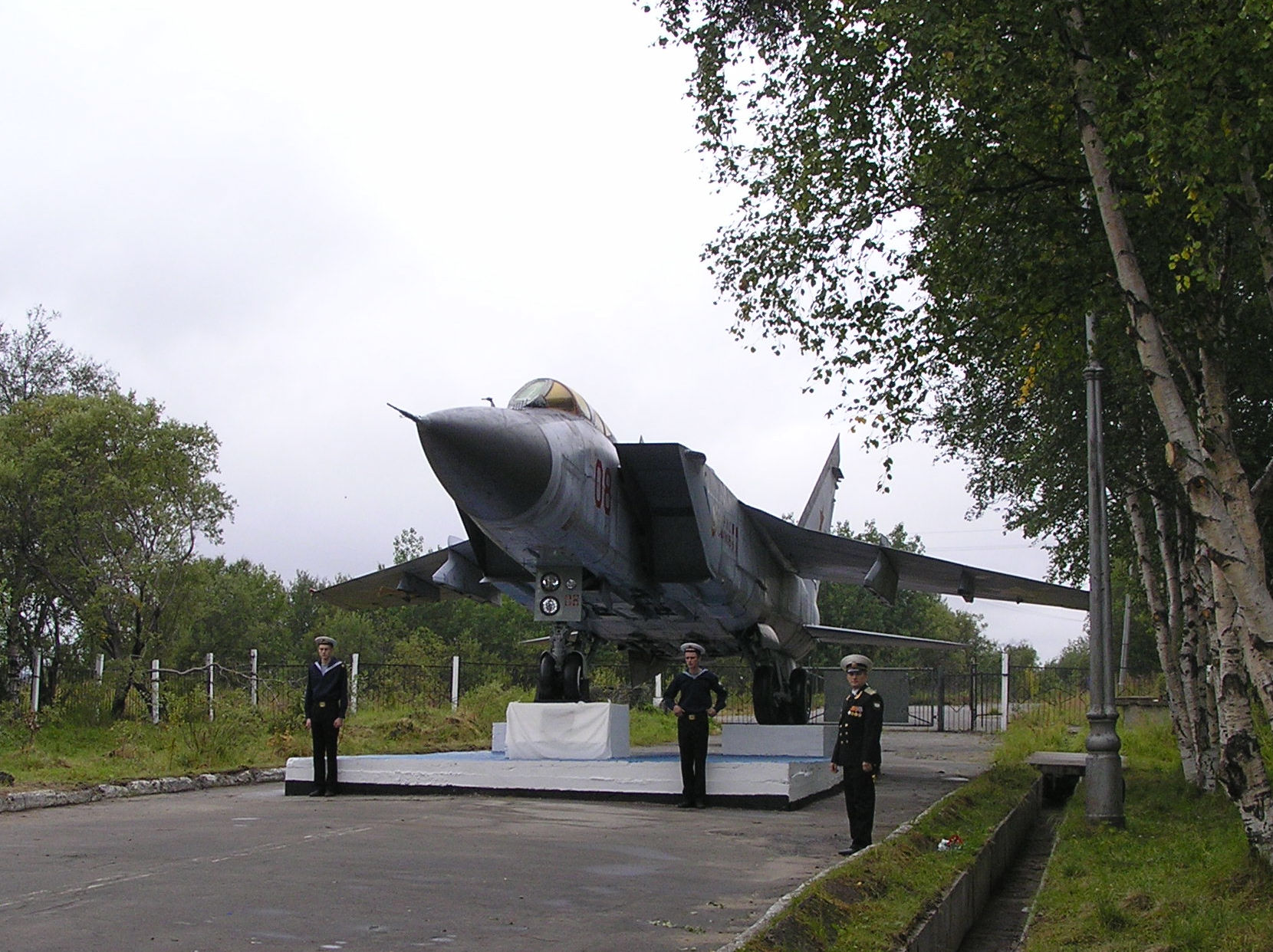 Музей военно-воздушных сил Северного флота. МиГ-31 им. Б.Ф. Сафонова. В день 70-летия ВВС СФ.